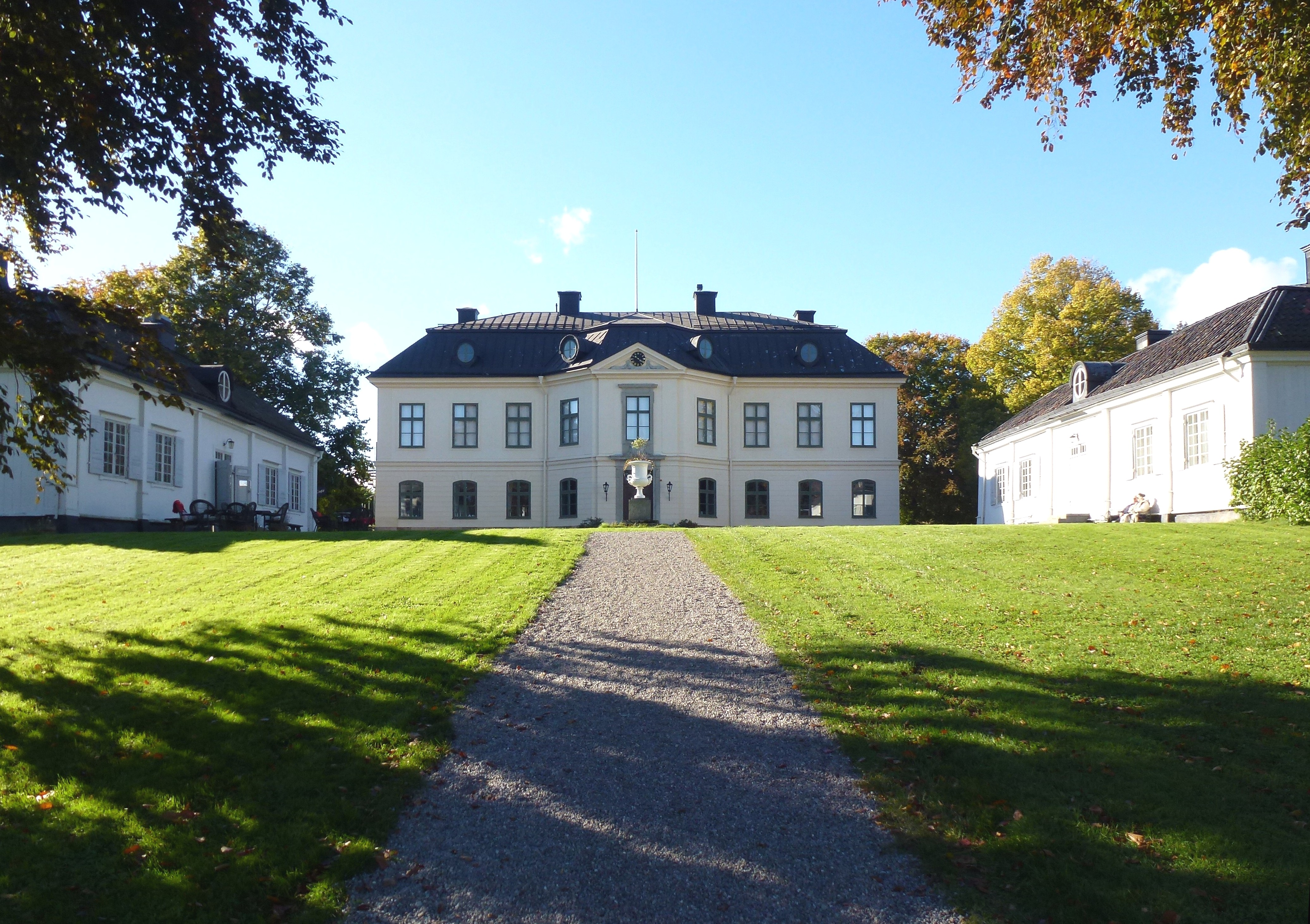 Sturehov slott